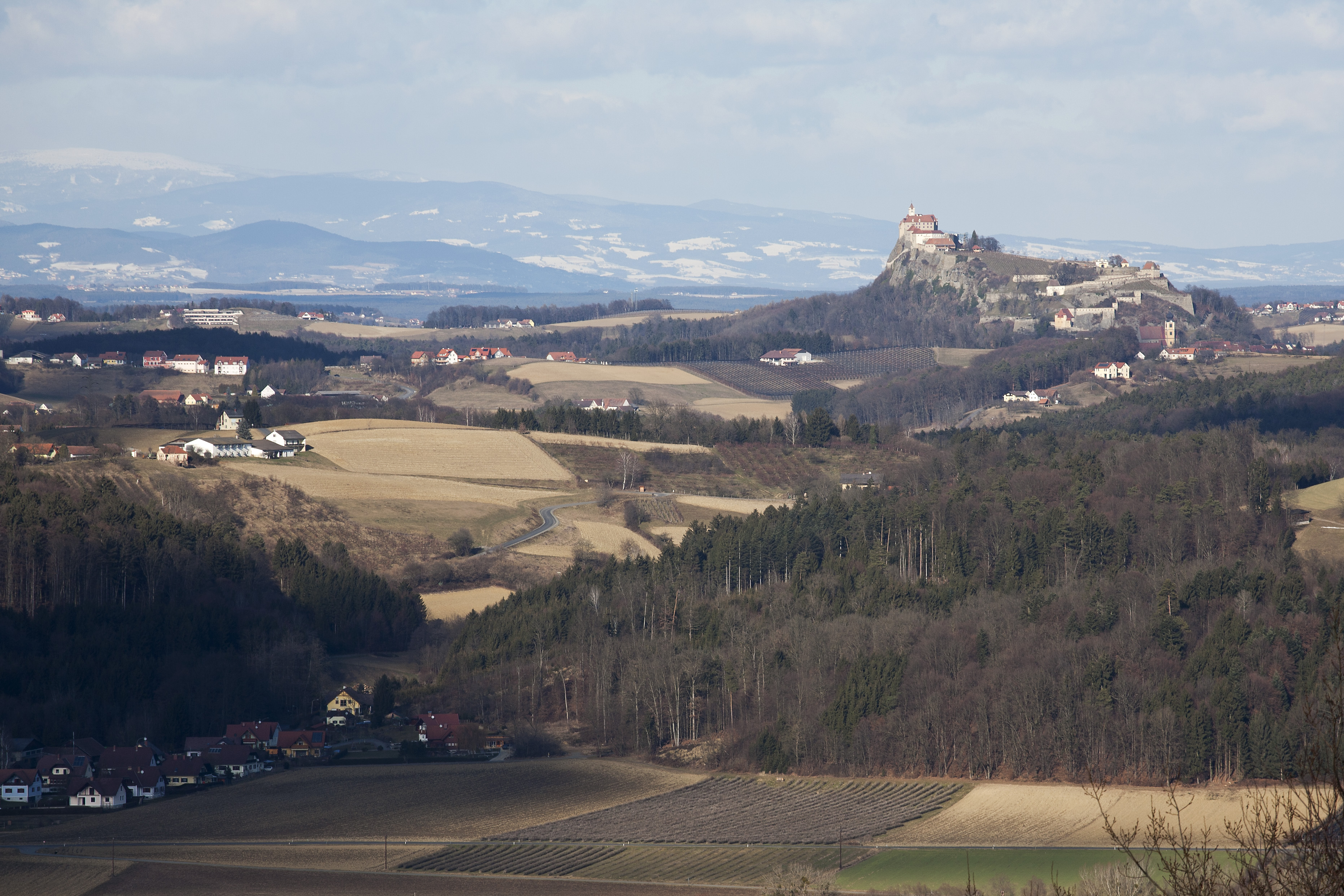 Blick zur Riegersburg vom Steinberg bei Mühldorf,BH Feldbach